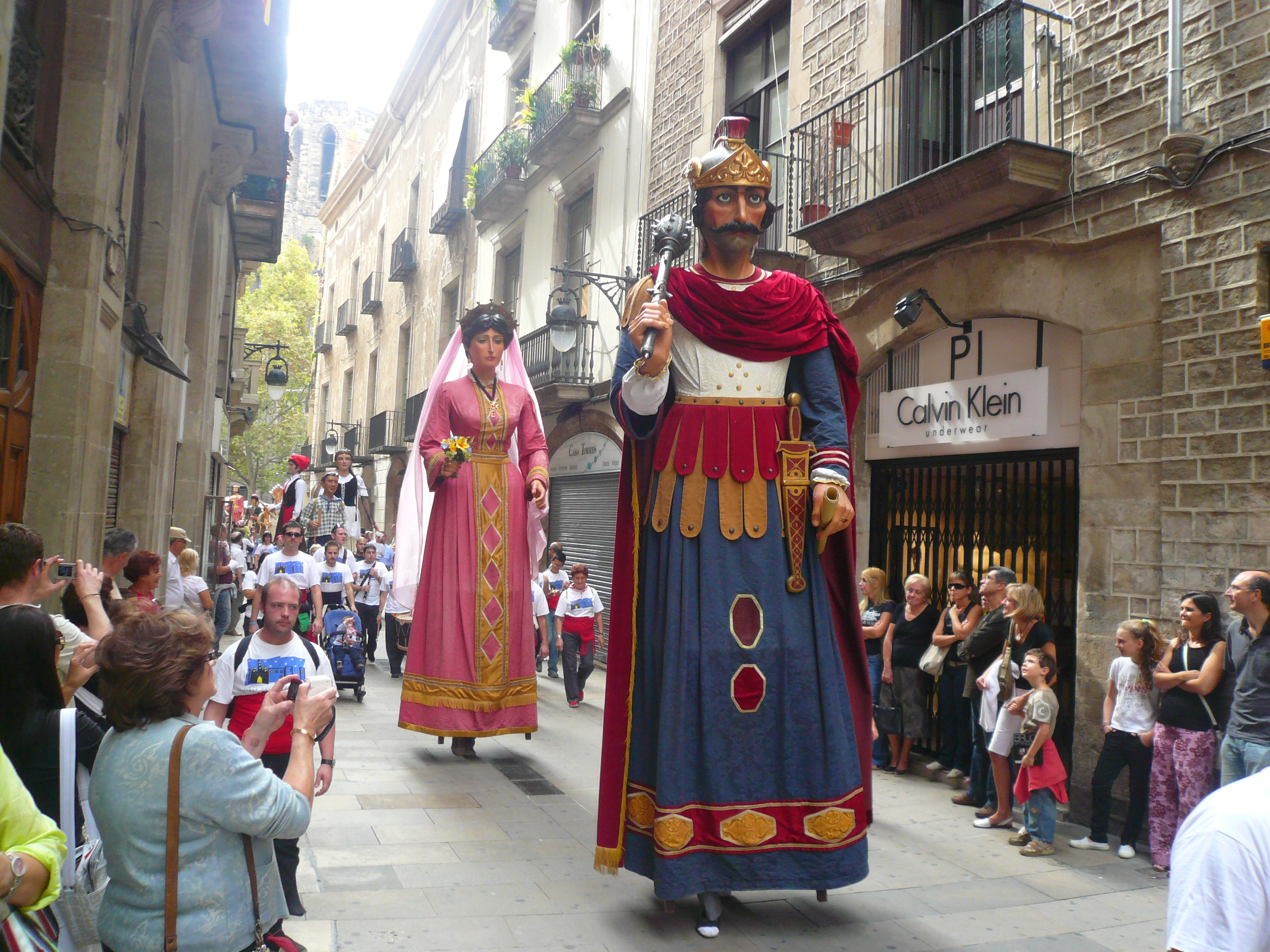 Cavalcada de gegants de les festes de la Mercè del 2008, al tram del carrer Cardenal Casañas, carrer del Pi, carrer Canuda i la Rambla